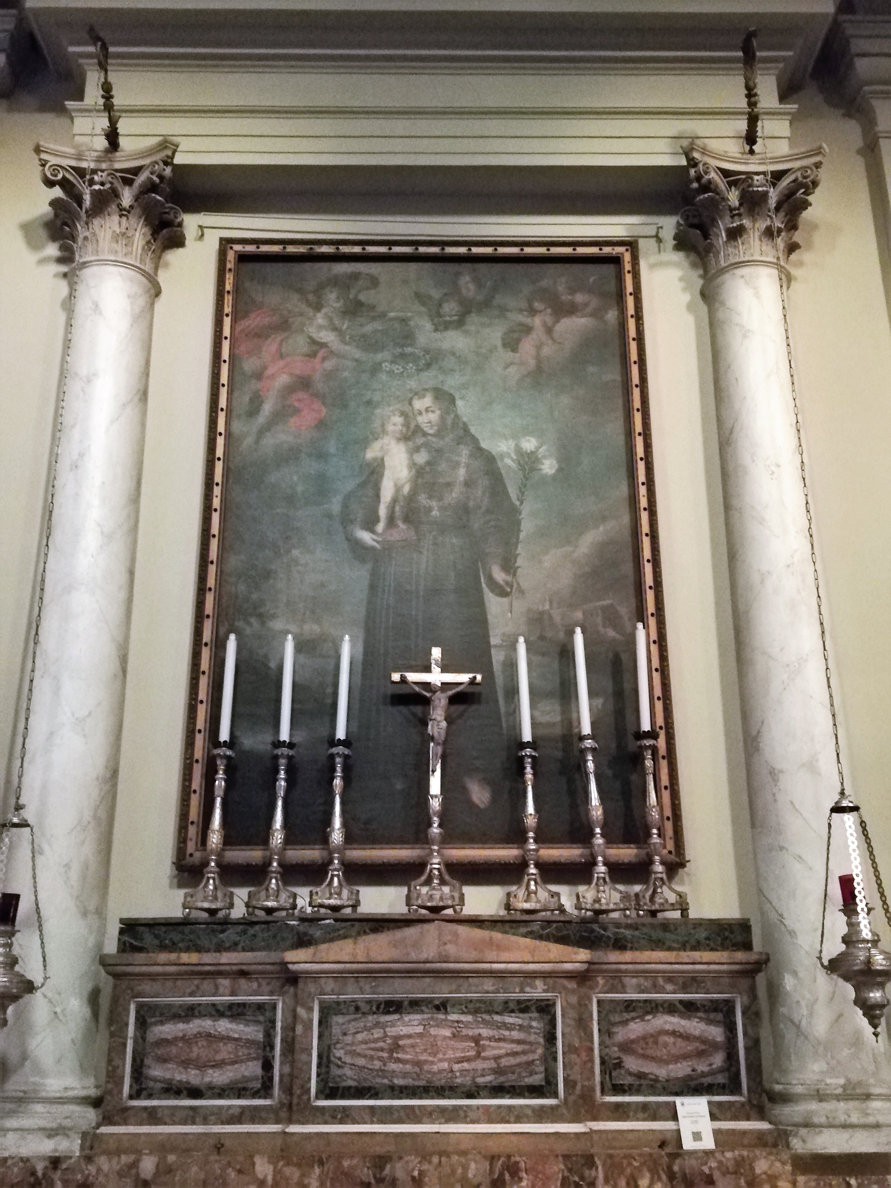 Sant'Antonio di Padova, di Giacinto Platania, cappella eponima, cattedrale di Acireale.